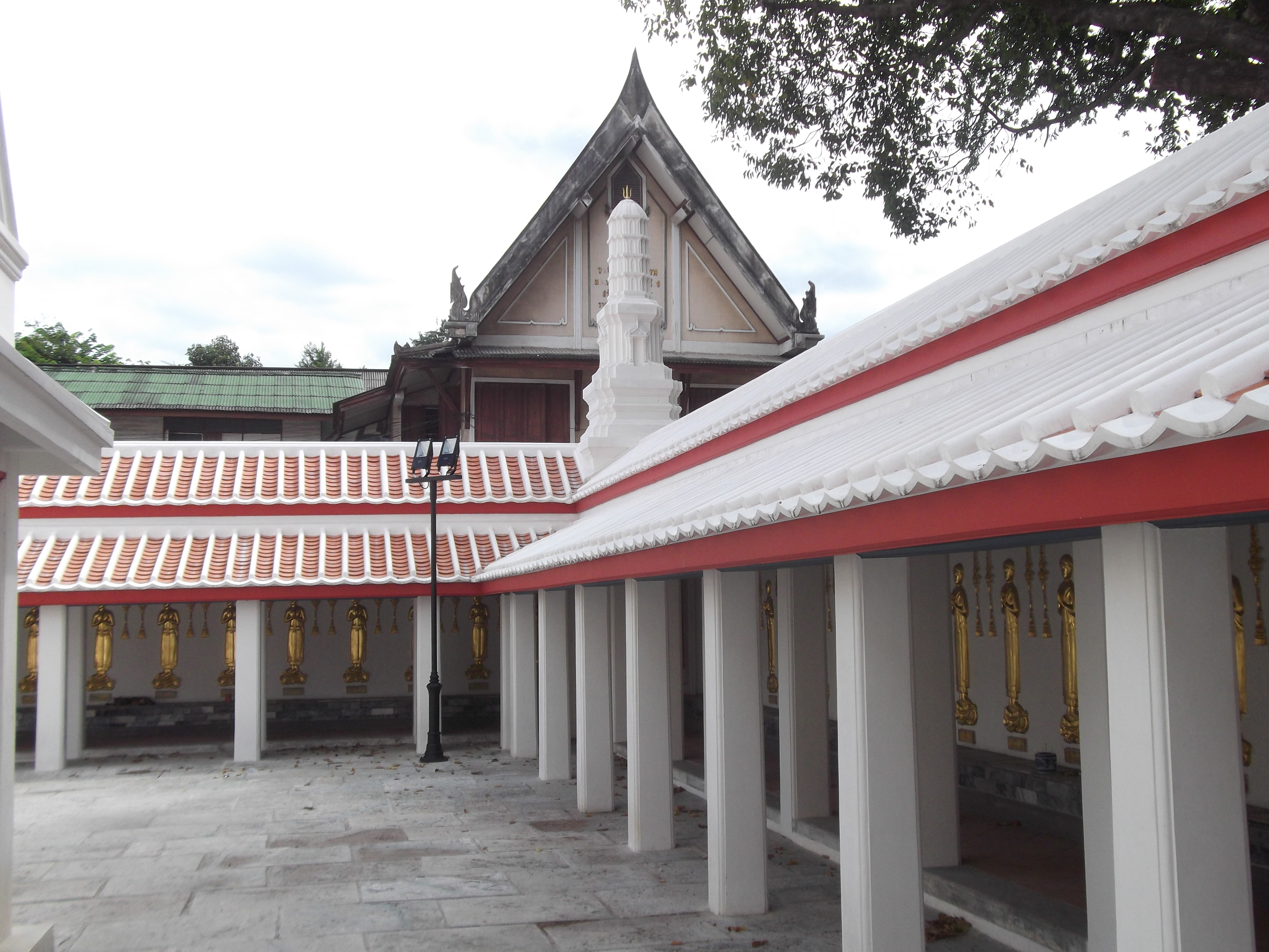 วัดบรมนิวาส